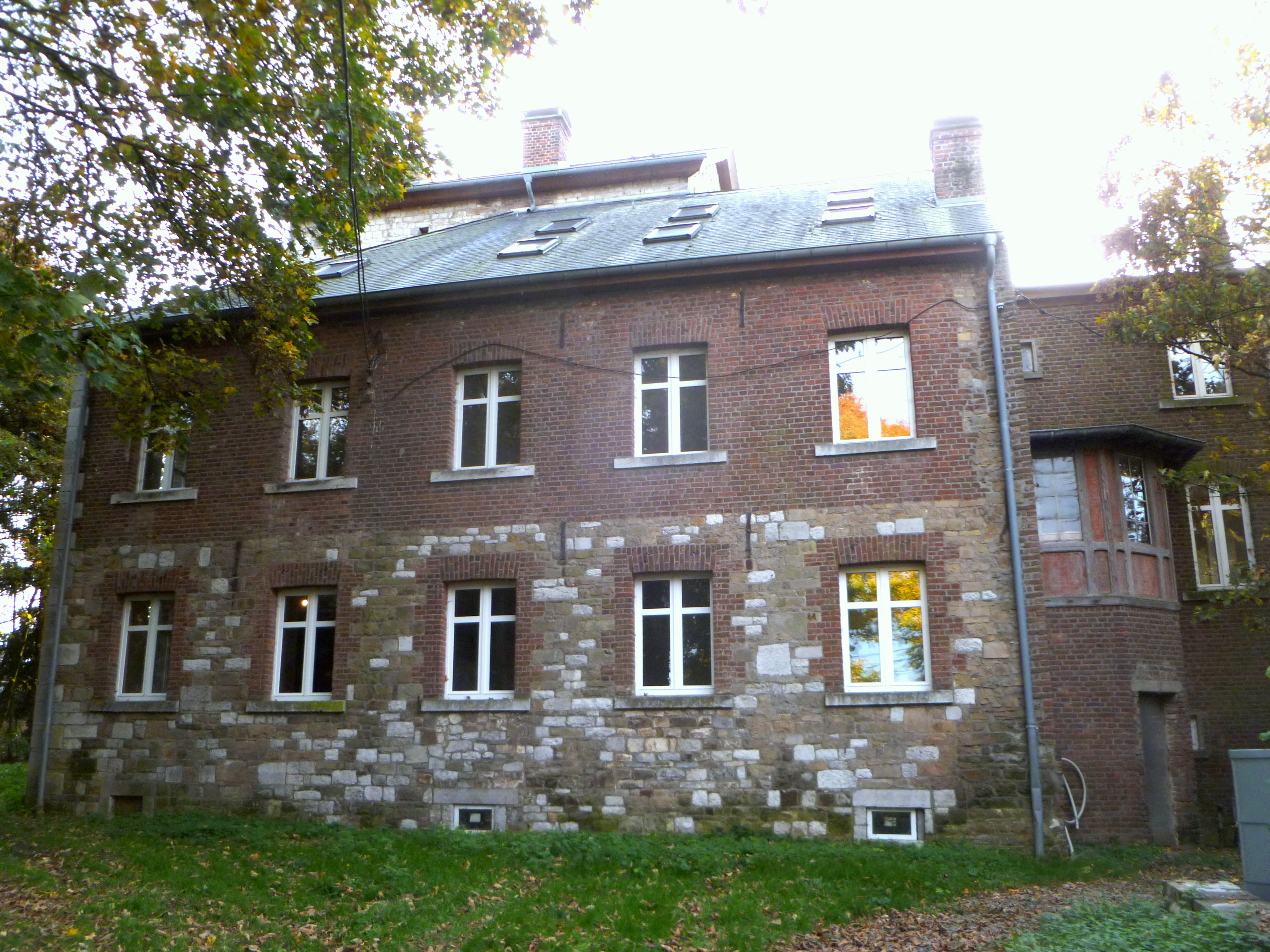 Baudenkmal in Eupen